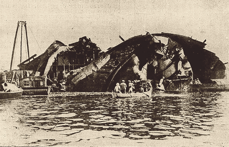 Couraçado Liberté francês, que às 5 h e 35 m de 25 de setembro de 1911 teve sucessivas explosões em seu paiol de munições da 1ª torre, em Toulon. Legenda da foto: O que resta do couraçado "Liberté", visto pela proa. À direita, ao nível da água, sob o tombadilho virado, vê-se uma torre de canhões de 194 milímetros, também completamente voltada. Mais atrás, sob um montão de chapas de aço, o passadiço da popa, intacto.